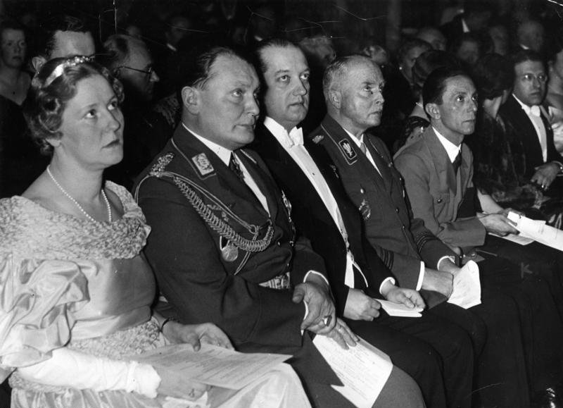 Eröffnung des Deutsch-Polnischen Instituts Scherl: Festkonzert anlässlich der Eröffnung des Deutsch-Polnischen Instituts an der Lessing-Hochschule im Marmorsaal des Zoos v.l.n.r. Frau Emmy Sonnemann, Ministerpräsident Göring, polnischer Botschafter Lipski, Herzog v. Sachsen-Coburg-Gotha, Reichsminister Dr. Goebbels 26. Feb. 1935 [Herausgabedatum] ADN-ZB/Archiv Faschistisches Deutschland 1933-1945 Festkonzert am 26.2.1935 im Marmorsaal des Zoos anläßlich der Eröffnung des Deutsch-Polnischen Instituts an der Lessing-Hochschule in Berlin. V.l.n.r.: Frau Emmy Sonnemann (spätere Frau Göring), Ministerpräsident Göring, der polnische Botschafter Lipski, der Herzog v. Sachsen-Coburg-Gotha, Reichsminister Goebbels Abgebildete Personen: Göring, Hermann: Reichsmarschall, Oberbefehlshaber der Luftwaffe, Ministerpräsident von Preußen, Deutschland Sonnemann, Emmy: Siehe: Göring, Hermann, Goebbels, Joseph: Reichsminister für Volksaufklärung und Propaganda, Gauleiter Berlin, Deutschland Lipski, Josef: Gesandter in Deutschland, Polen Sachsen-Coburg und Gotha, Karl-Eduard von: 1884-1954, Herzog, Präsident des Deutschen Roten Kreuzes, Deutschland